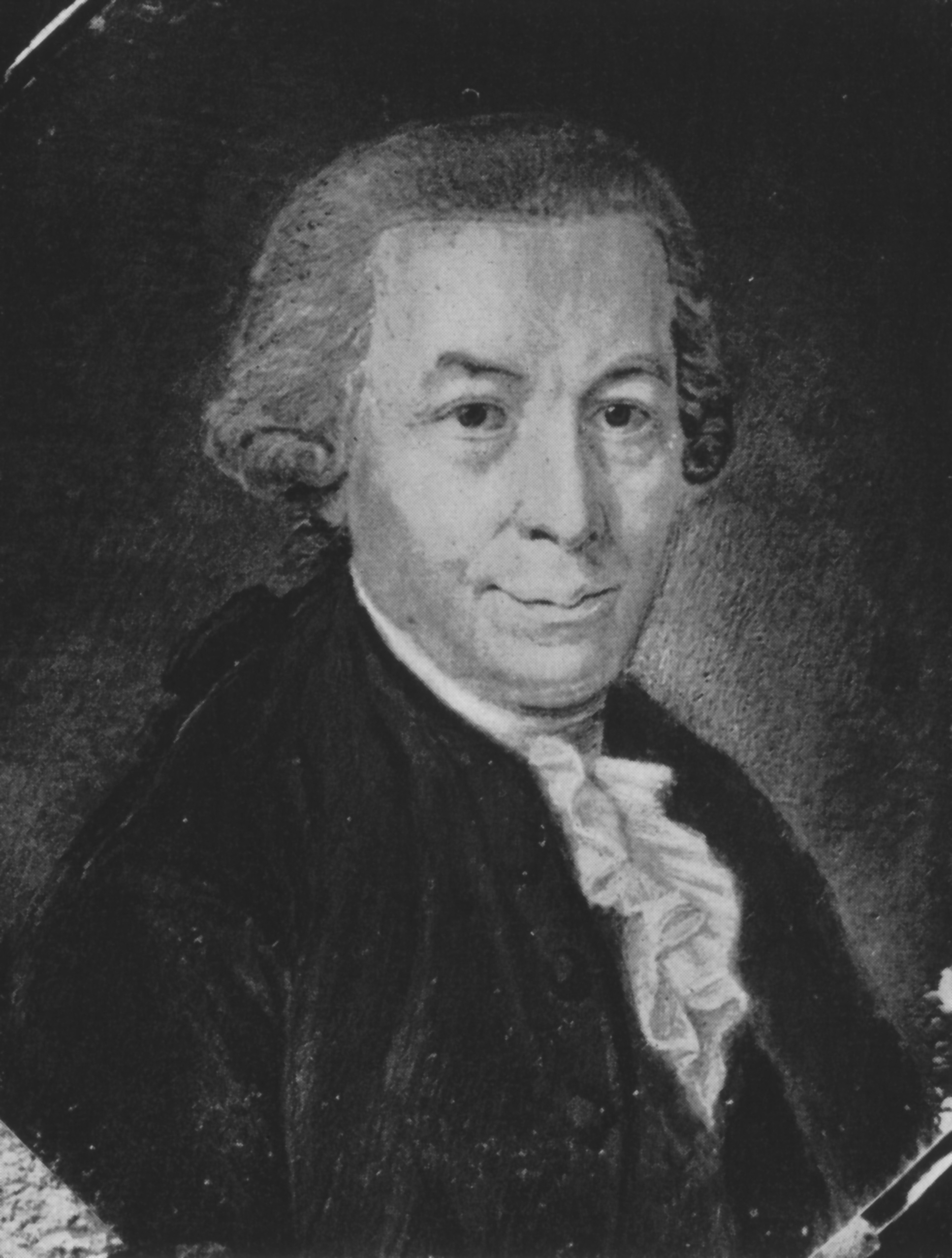 Carl Henrich Dreyer, auch Johann Carl Heinrich Dreyer und diverse andere Namensformen (* 13. Dezember 1723 in Waren (Müritz); † 15. Februar 1802 in Lübeck), deutscher Rechtswissenschaftler und Lübecker Politiker des 18. Jahrhunderts